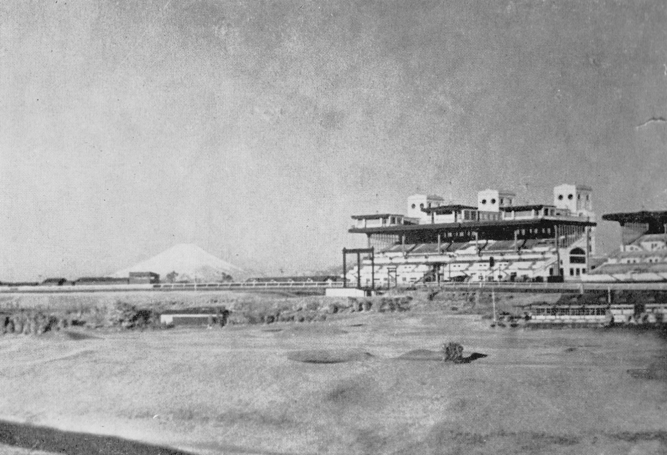 横浜競馬場 1929年(昭和4年）メインスタンドをコース内から